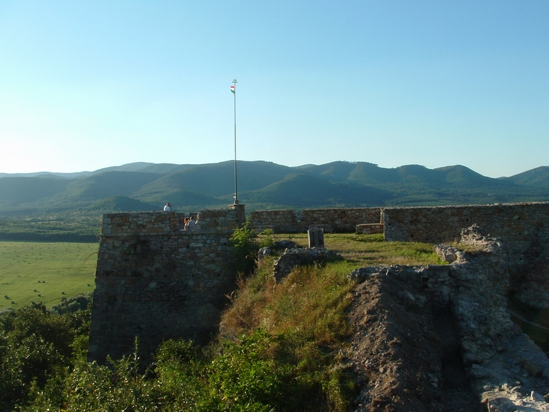 Das Börzsöny von der Burgruine von Nógrád aus gesehen (Blick nach NW)